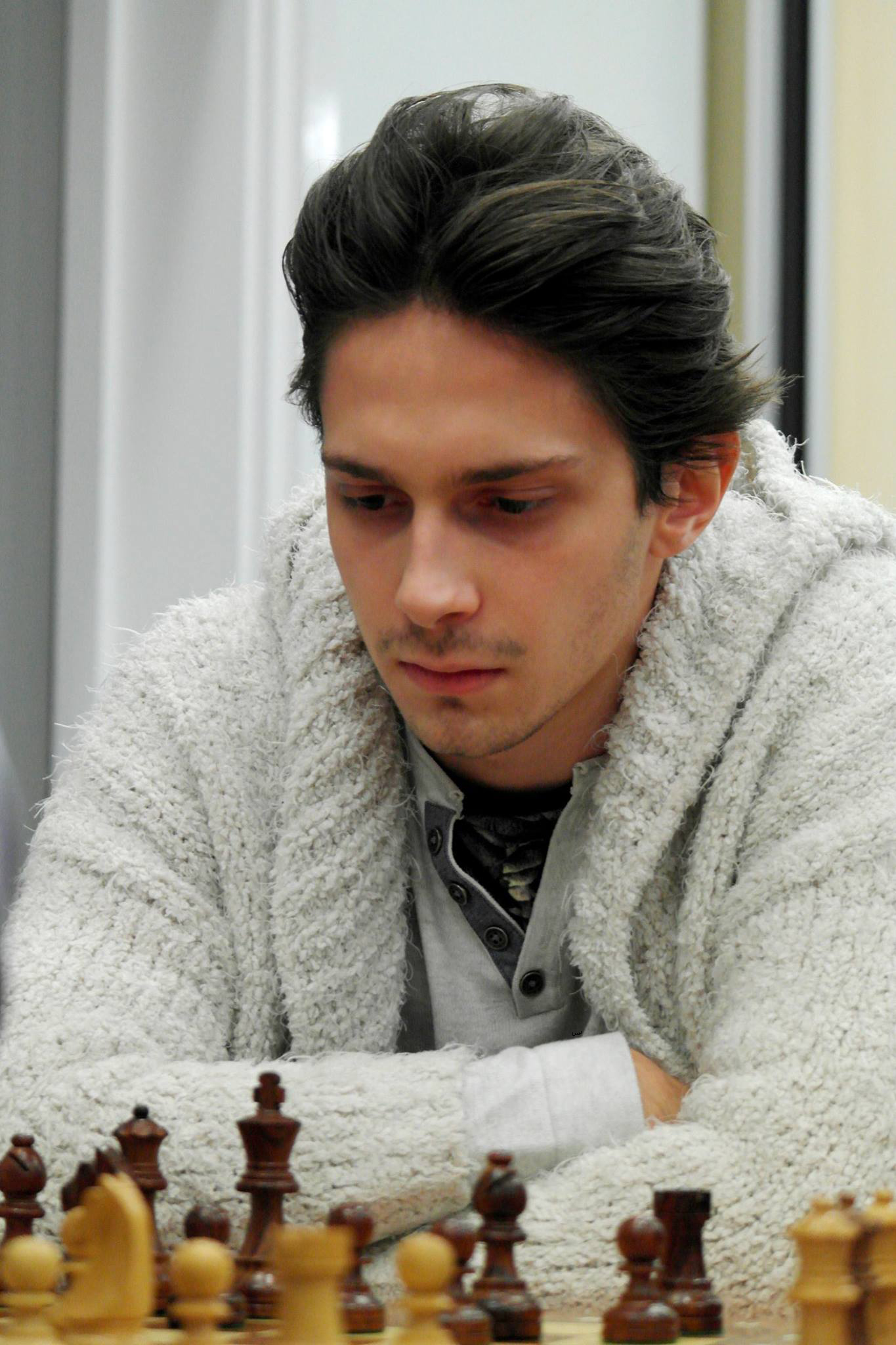 Jules Moussard au London Chess Classic